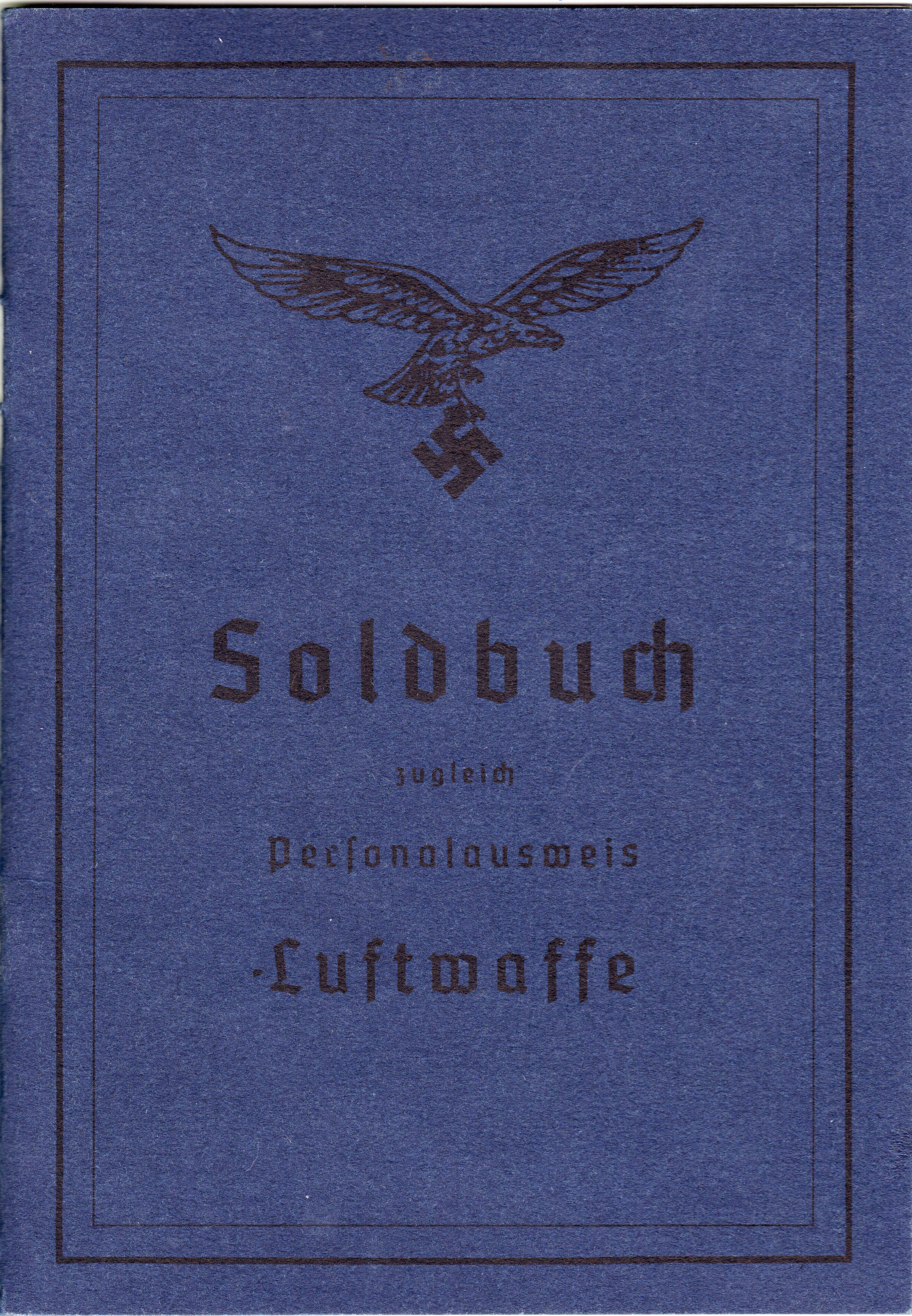 Nepoužitý průkaz pro příslušníky německé Luftwaffe. Nejspíše byl vydán v posledních dnech války.